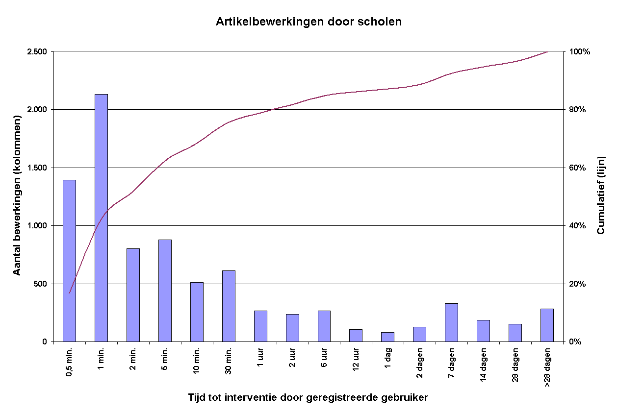 Grafiek over schoolvandalisme op nl.wiki